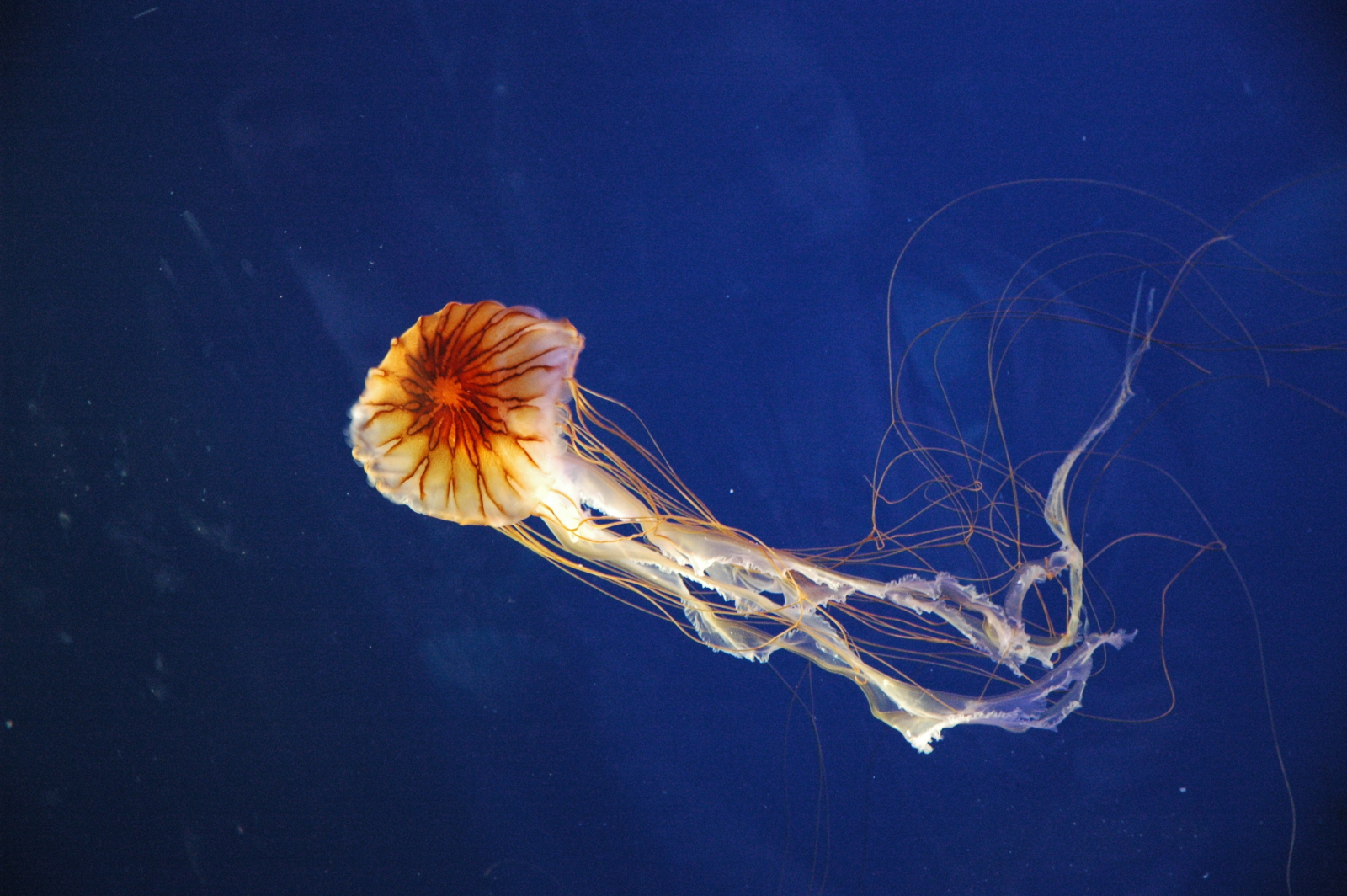 Medusa (Acquario di Genova, Italy)